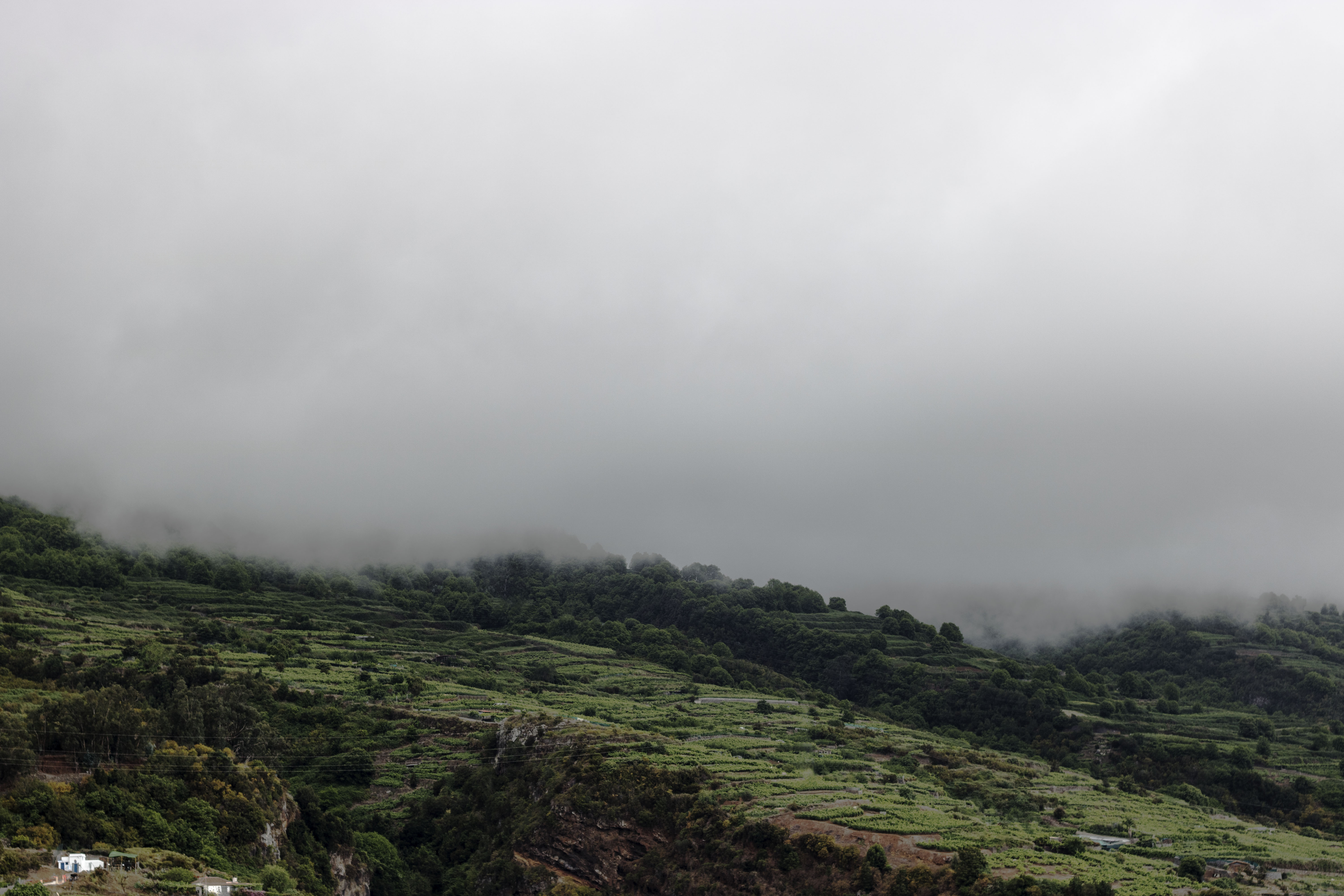 Vistas al Monte de la Victoria de Acentejo